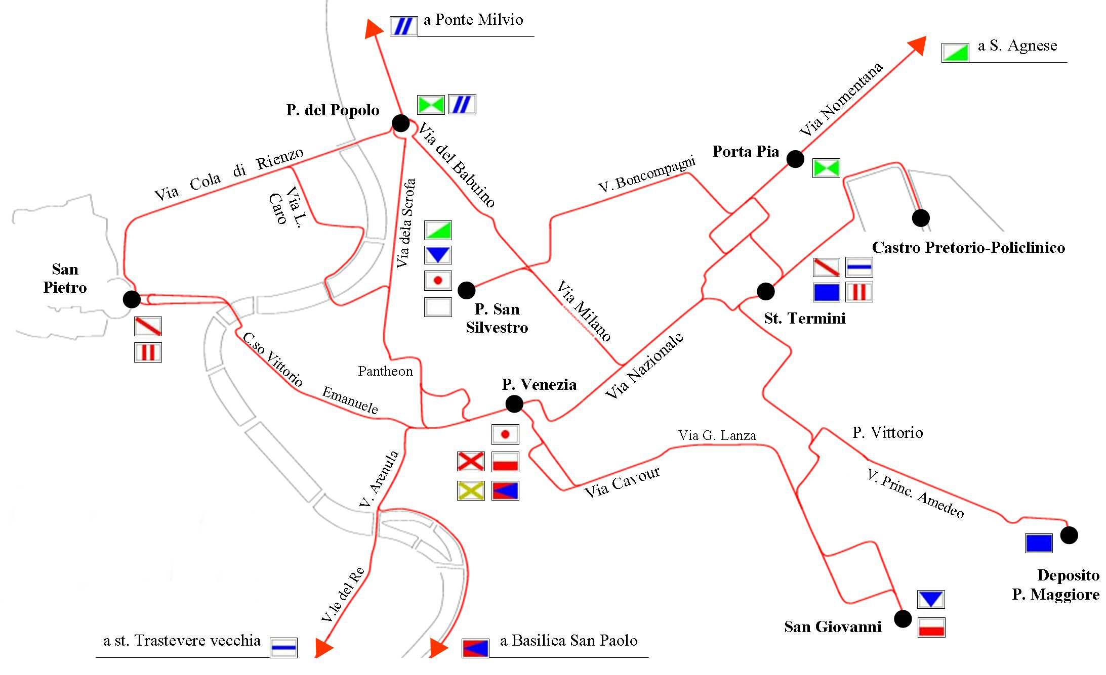 Mappa della rete tranviaria di Roma nel 1903.